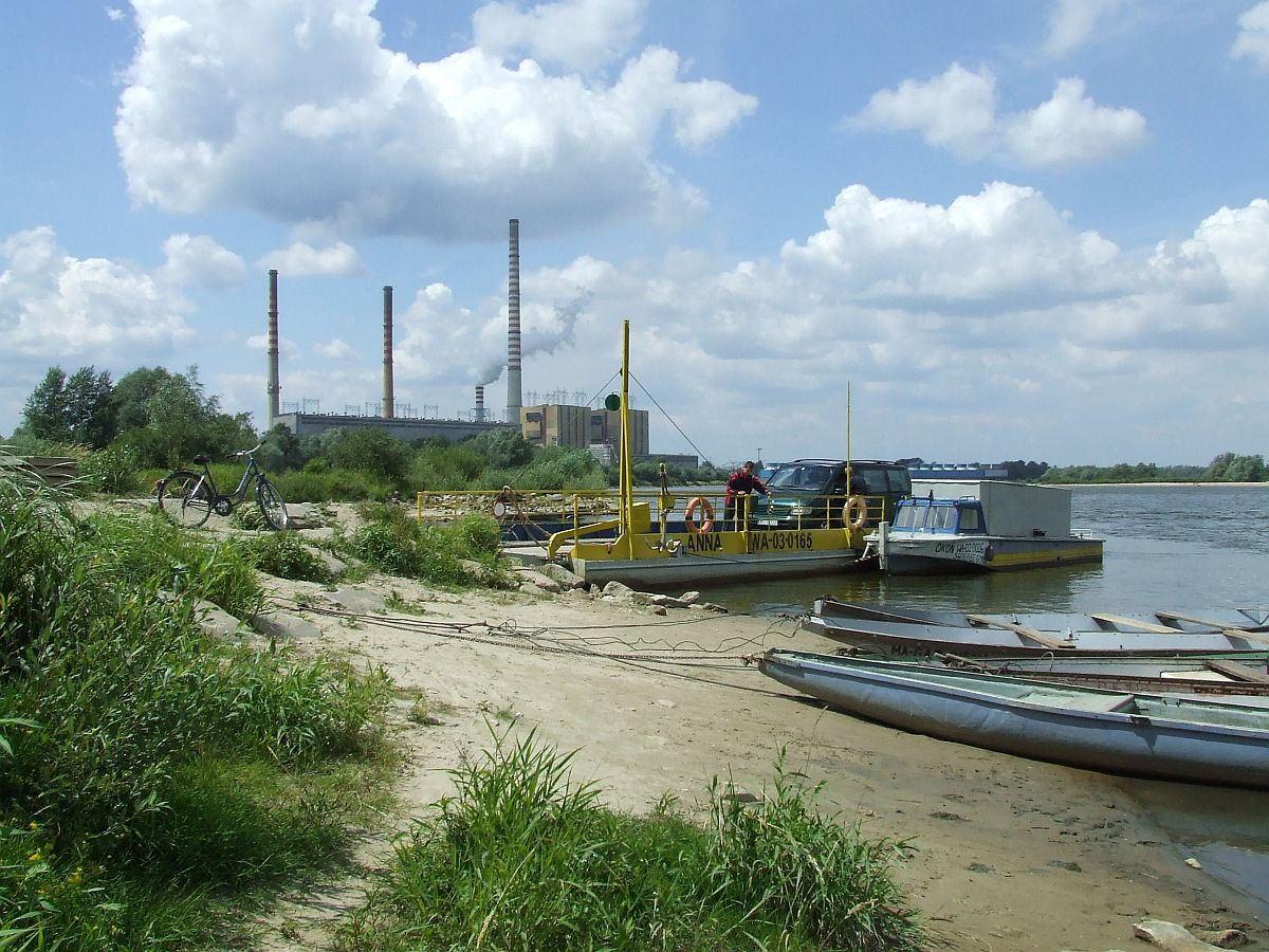 Prom na Wiśle, Świerże Górne